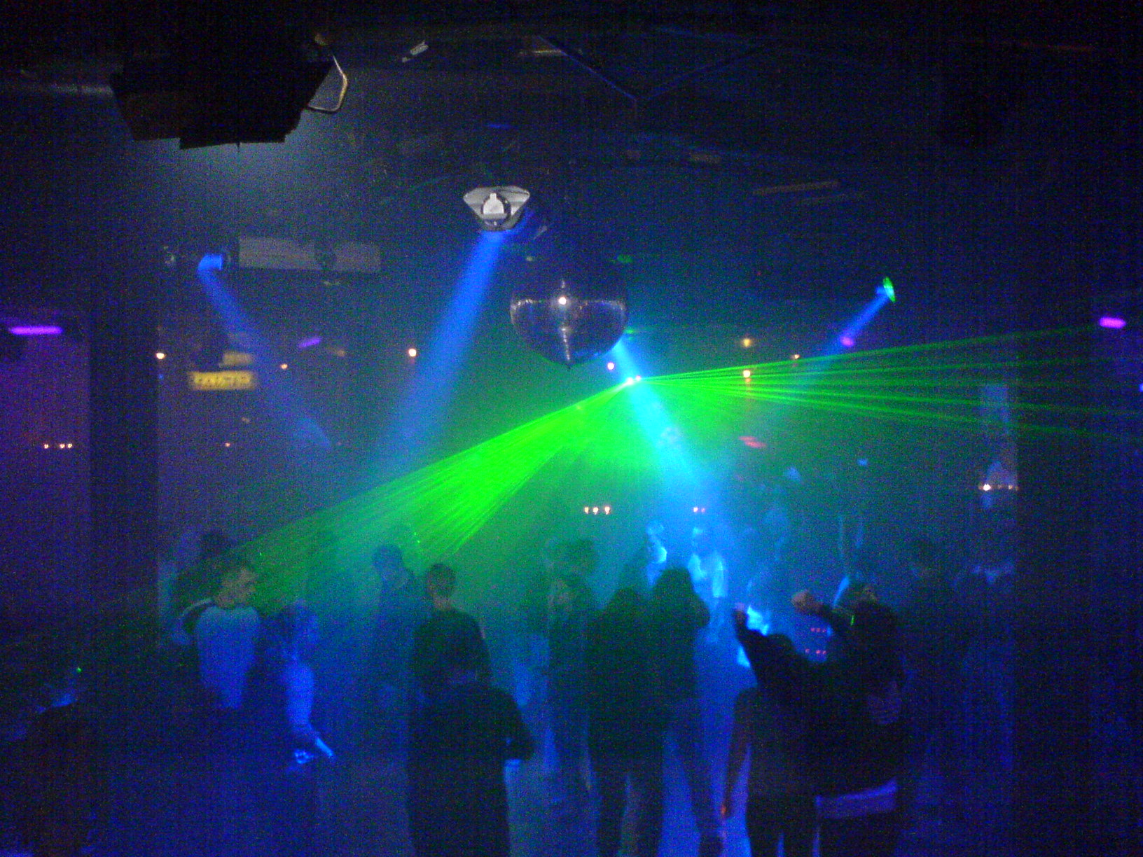 Hauptraum des Linientreu Berlin